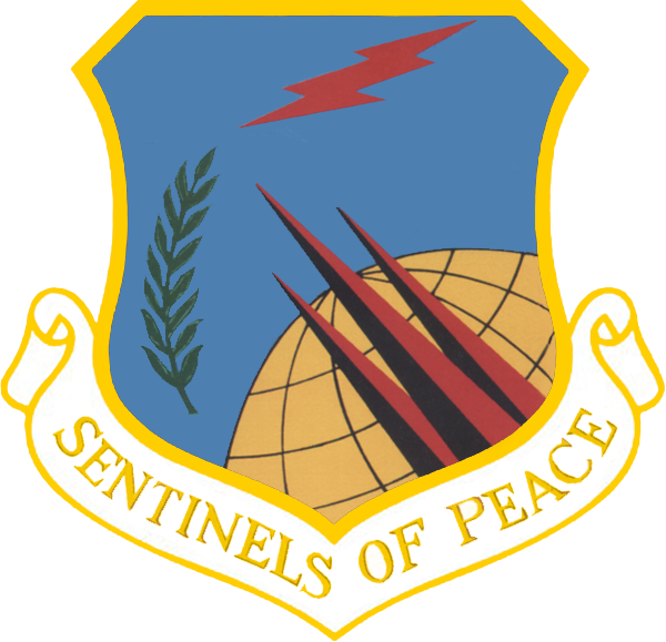 351st Missile Wing